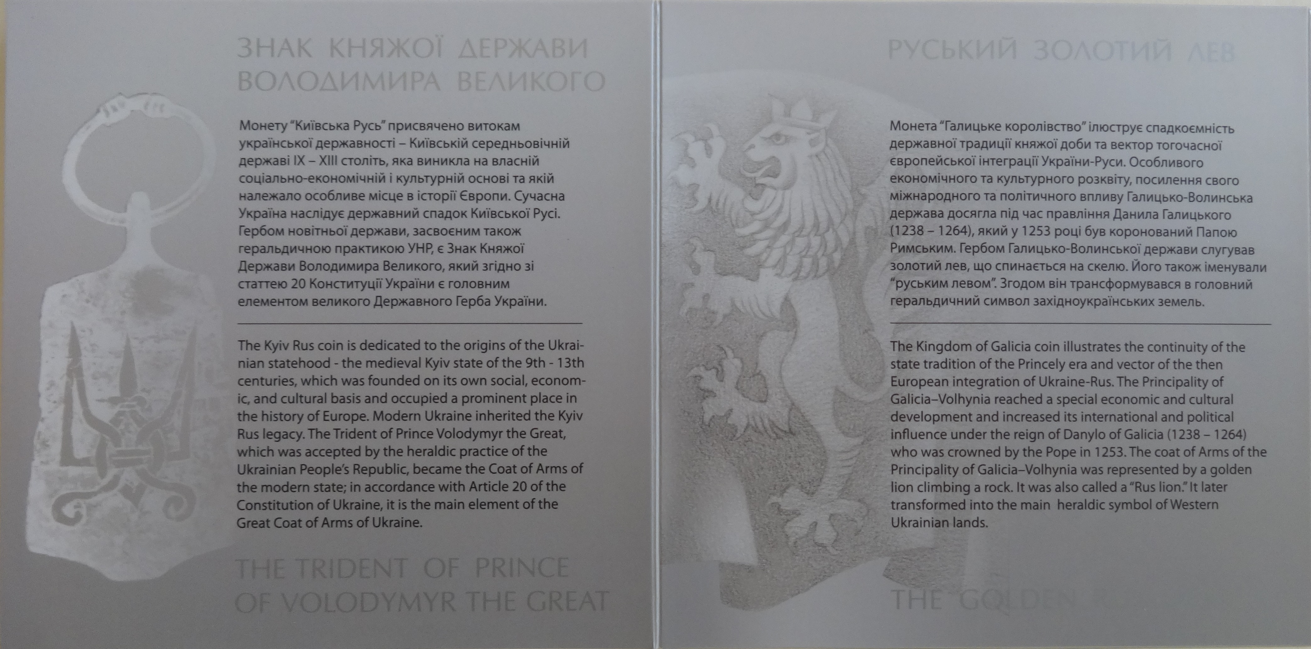 Набір монет НБУ «25 років незалежності України». Другий розворот.